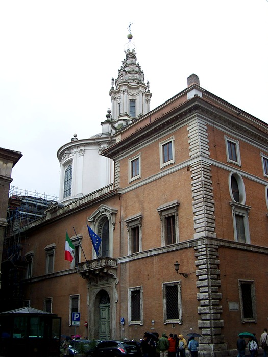 Roma - Cupola della Chiesa di S. Ivo alla Sapienza